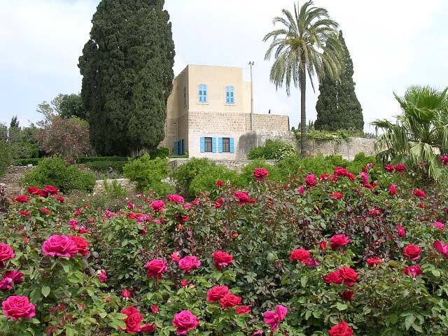 Mazra'ih